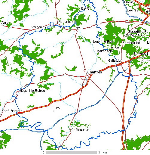 Carte du département d'Eure-et-Loir (France). Légende